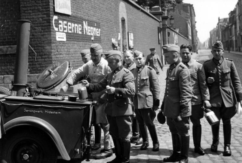 Schutzpolizei bei Feldküchenverpflegung